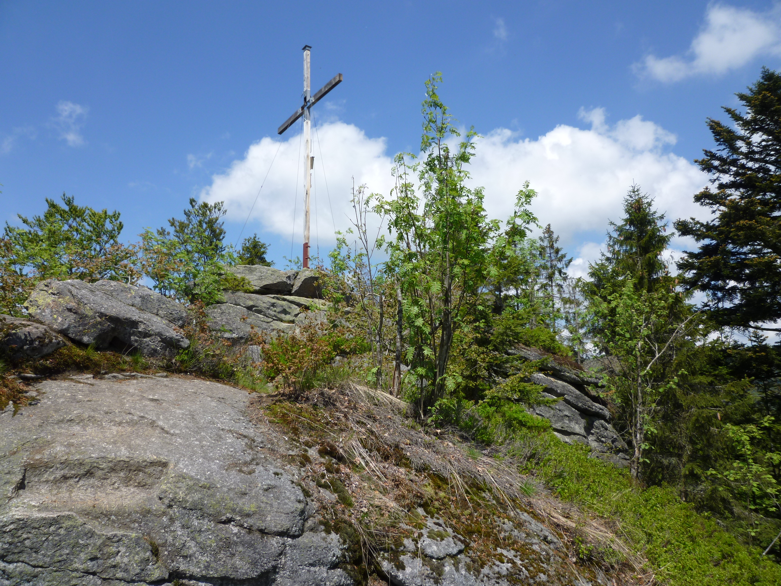 Die Große Kanzel im Nationalpark Bayerischer Wald ist Geotop mit der Nr. 272R013 im Landkreis Freyung-Grafenau und Naturdenkmal.